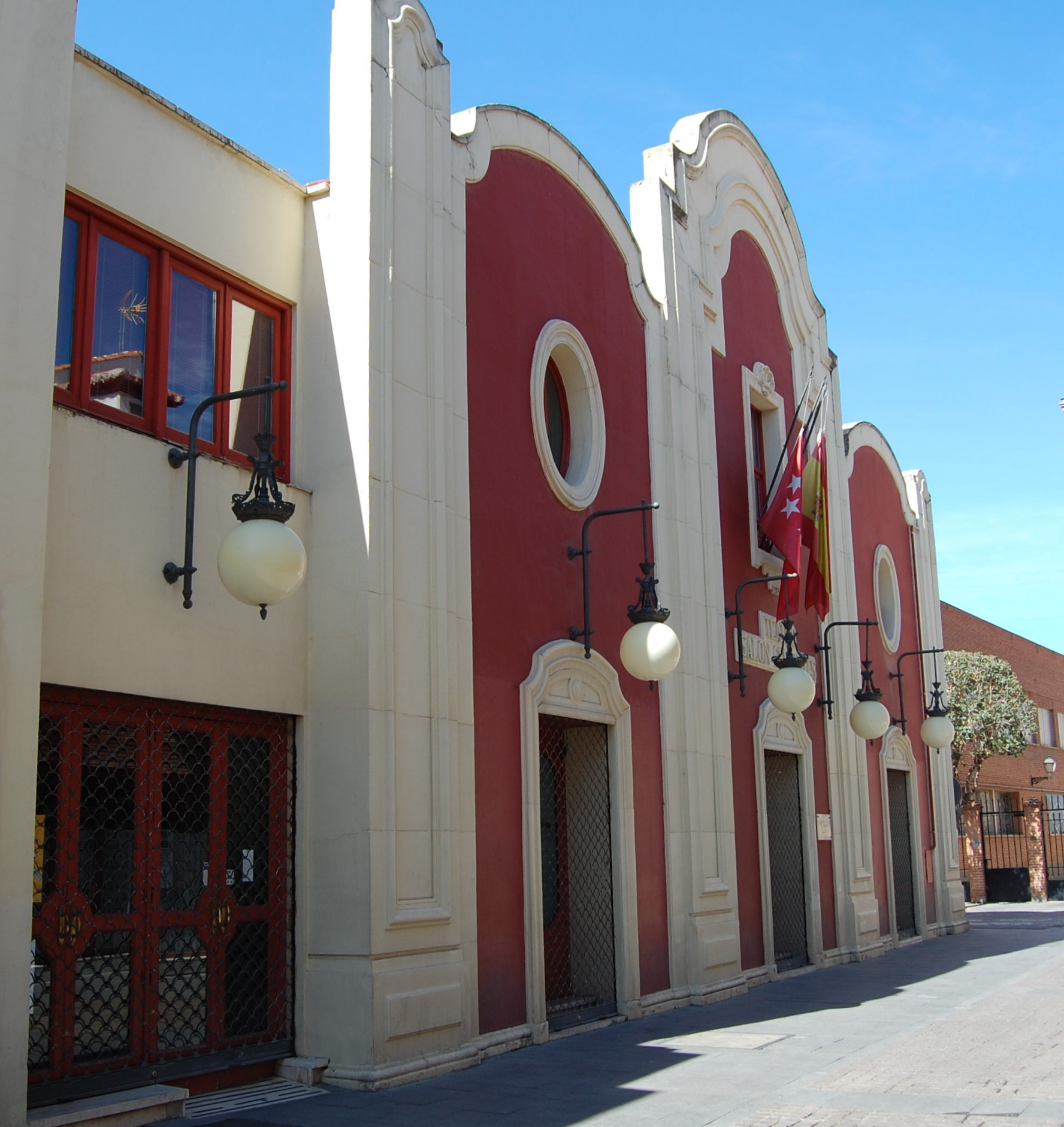 Fachada principal del Teatro Salón Cervantes de Alcalá de Henares (Comunidad de Madrid - España) de estilo modernista, construido e inaugurado en 1888. Reformado en 1925 y 1989.